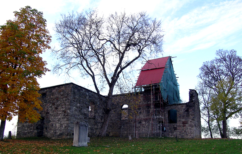 Nes kirkeruin, Nes, Akershus, Norway.